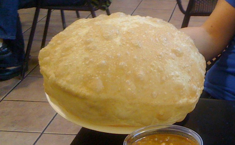 Vik's Chaat Corner